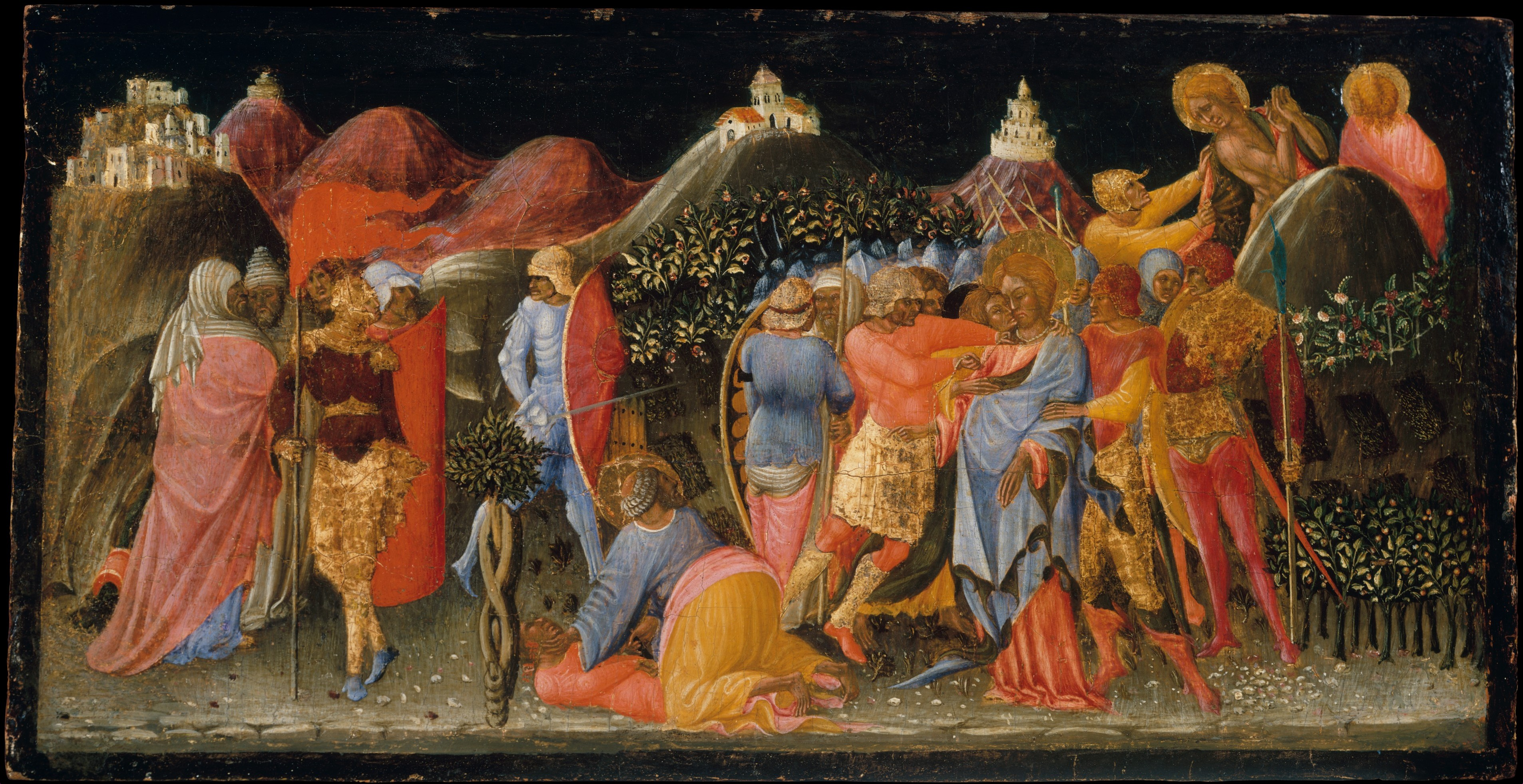 Painting, predella panel; Paintings